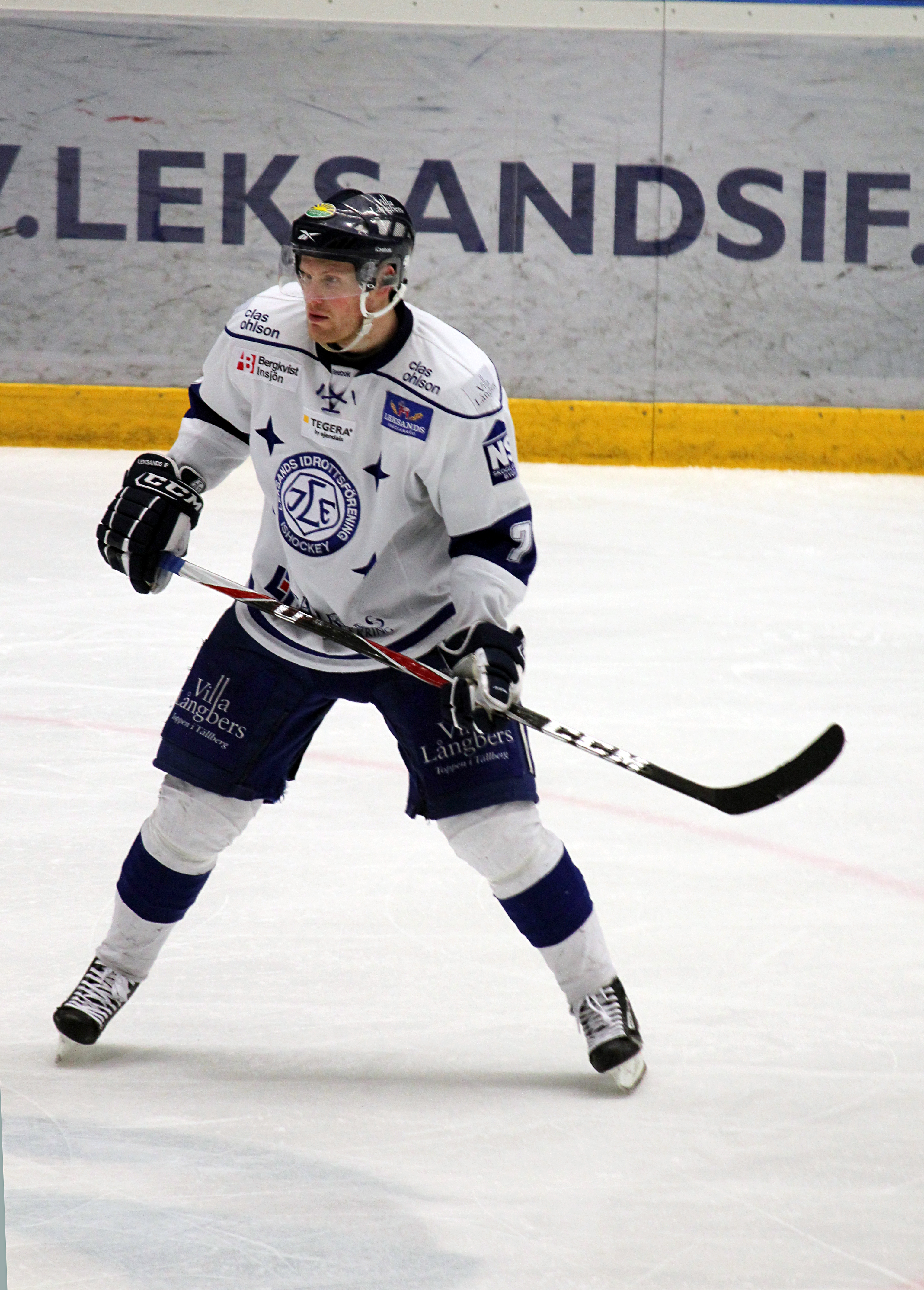 Stefan Erkgärds för Leksands IF mot Västerås IK 29 januari 2011.